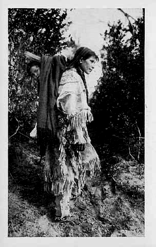 Anishinaabekwe (Ojibwe-vrouw), traditioneel gekleed in buckskin (hertenleer), torst haar baby op haar rug in een tiginaagan of draagwieg. Op deze wijze werden in de 14e tot en met de 18e eeuw de zuigelingen meegenomen op de lange migratieroutes rond het Bovenmeer.